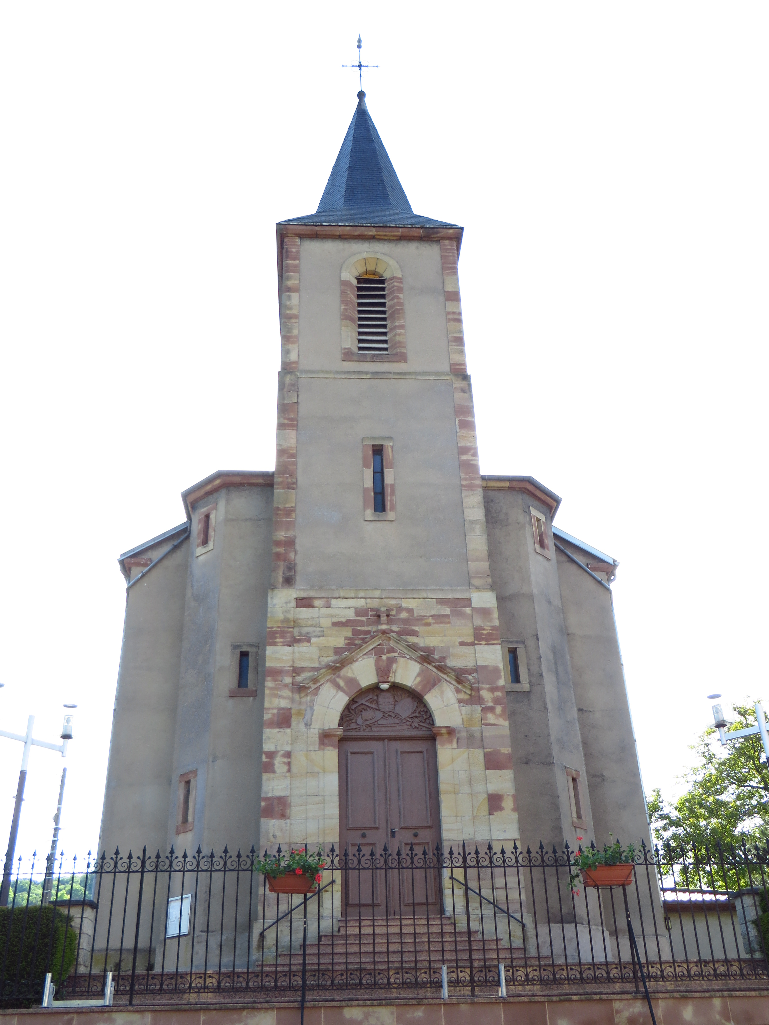 Betting eglise